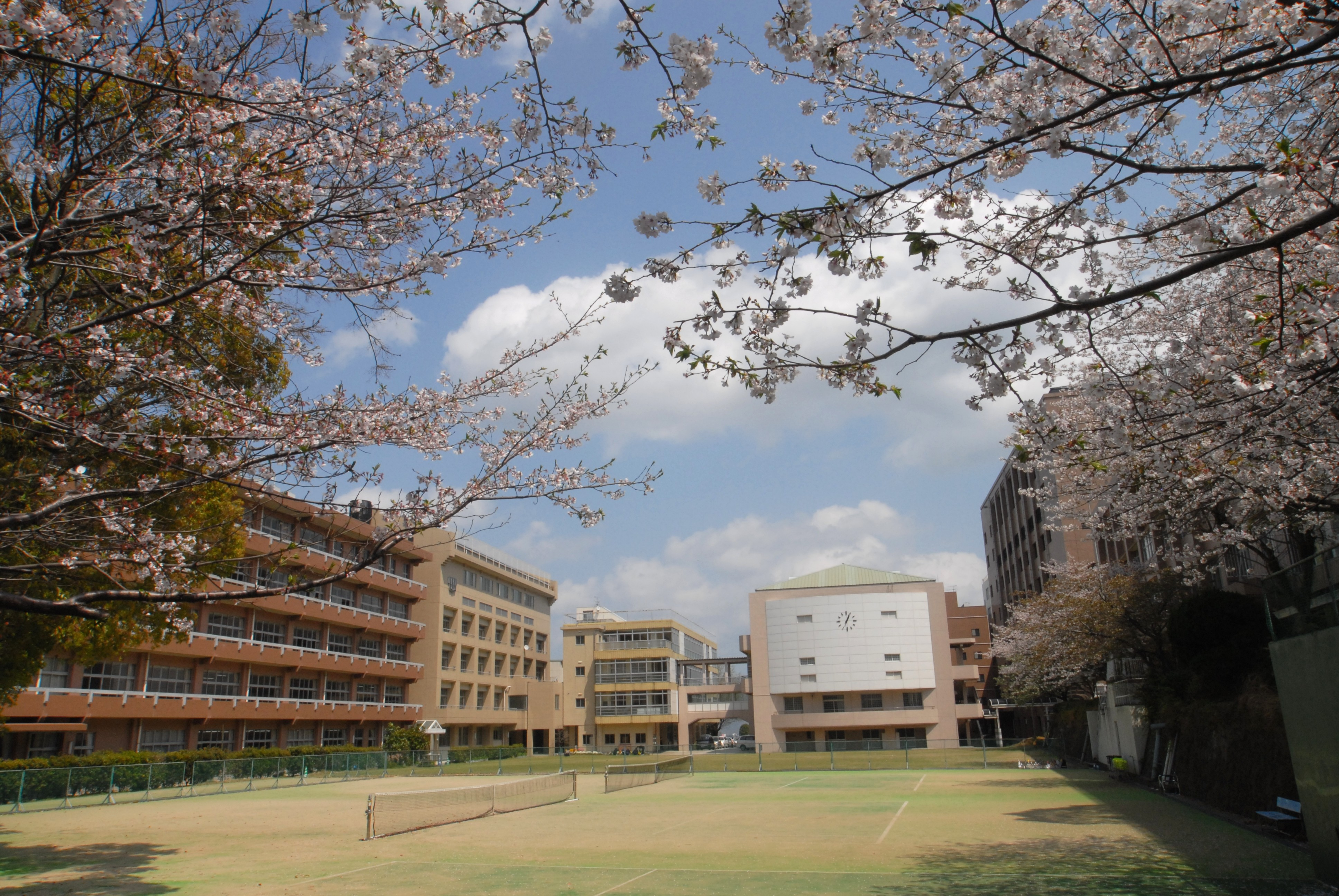 鹿児島市にある1933年創立の伝統あるカトリック女子校 学園標語「マリアさま いやなことは 私がよろこんで」